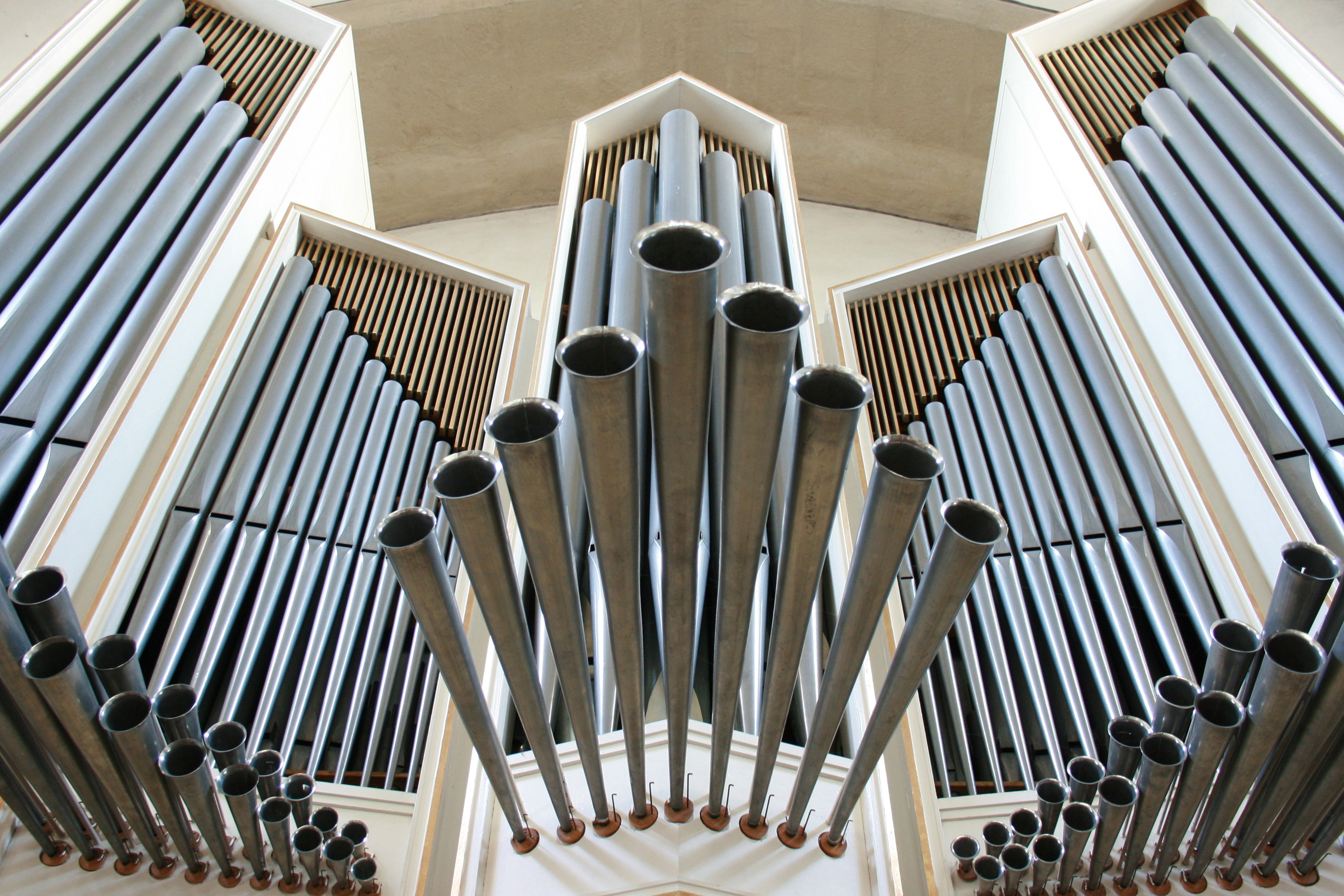 Evangelische Jakobus-Kirche an der Denkmalstraße in Breckerfeld